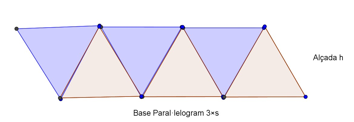 Paralelogram amb 6 triangles